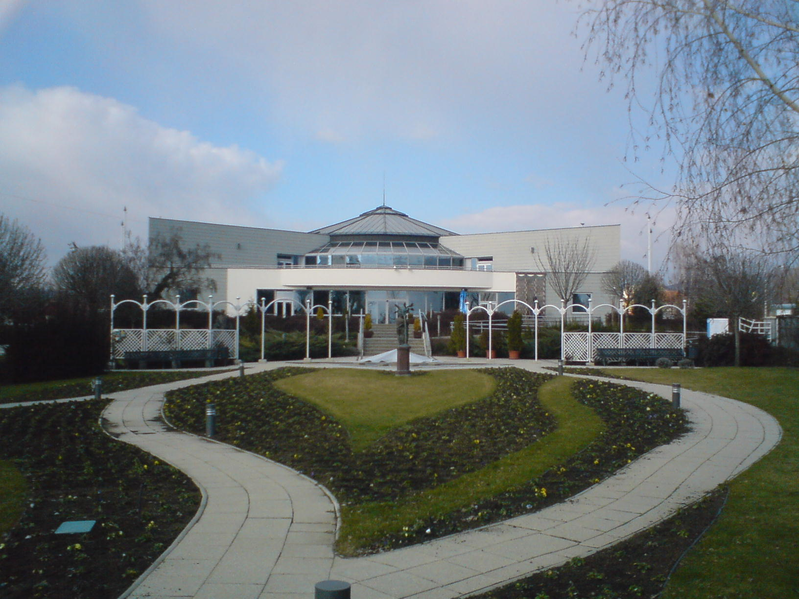 KRF